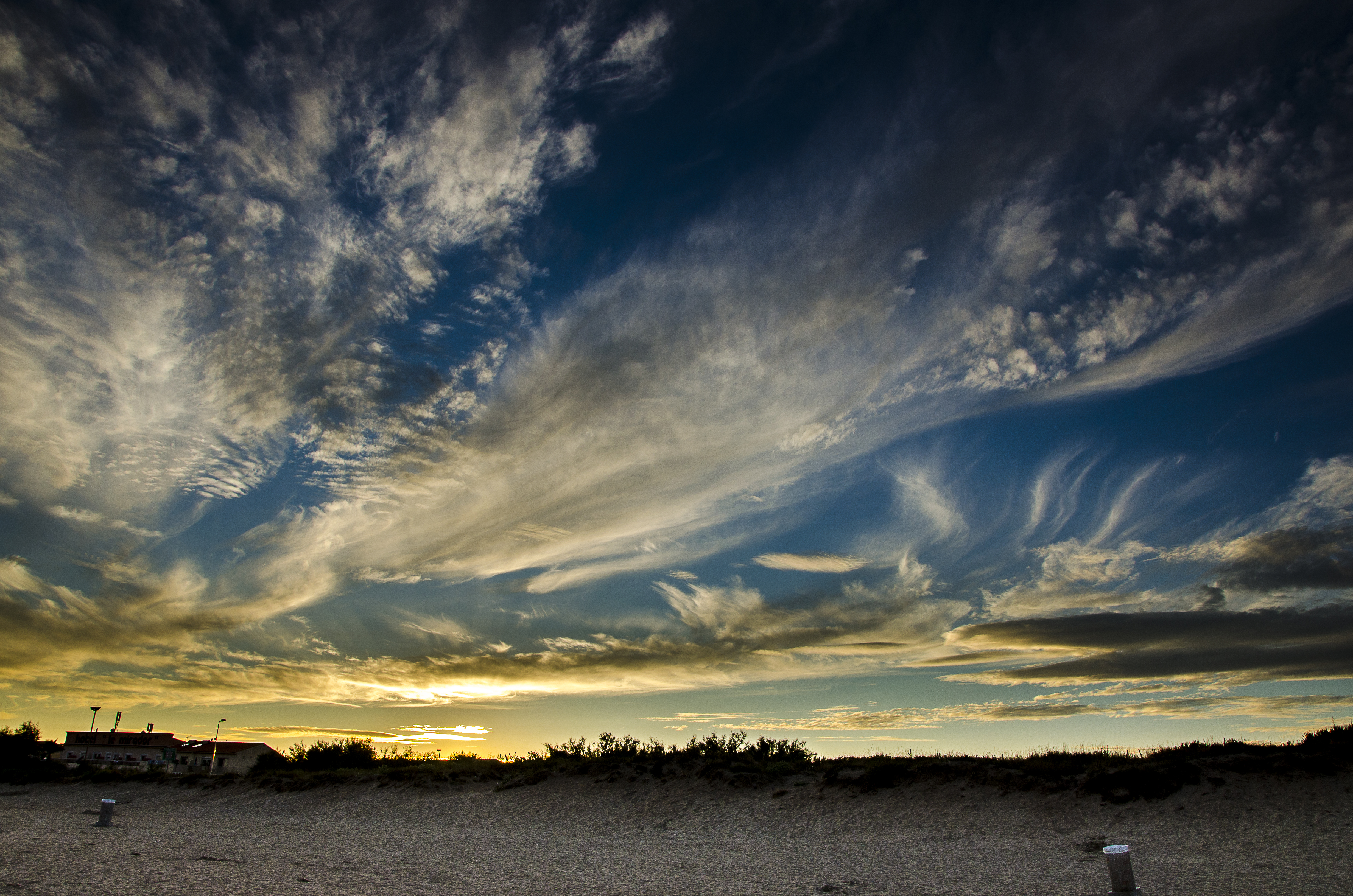 Portiragnes plage